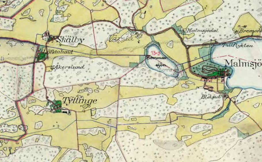 Malmsjö, Skälby, Löfstalund, Tyttinge på Häradsekonomiska kartan